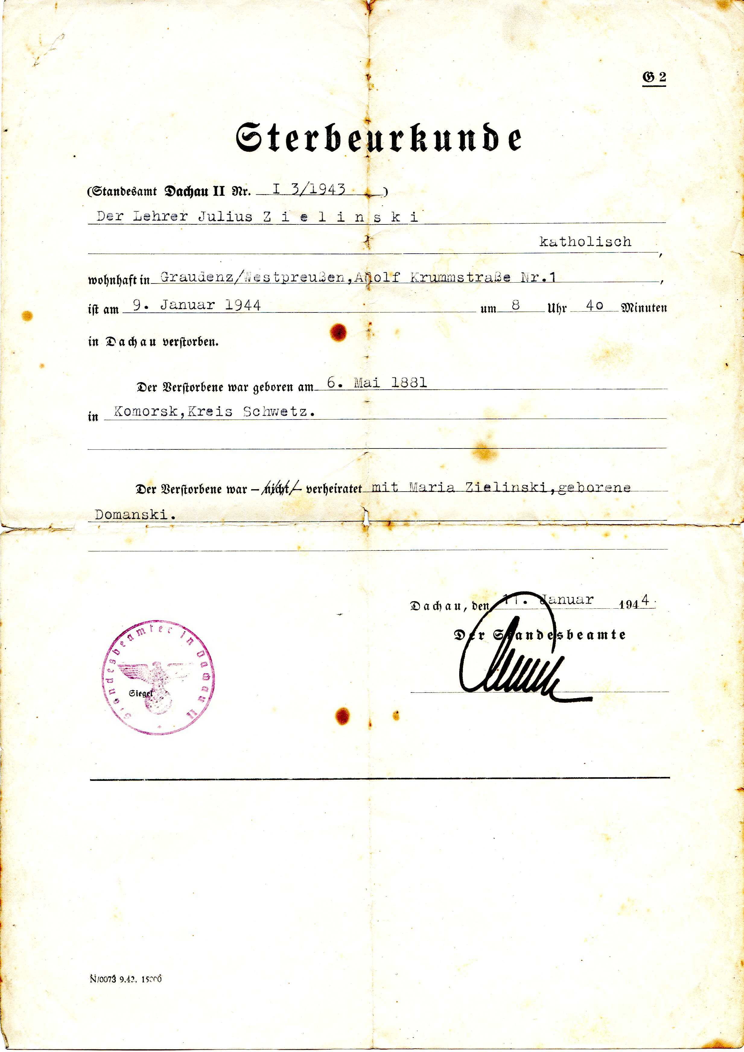 Świadectwo zgonu w obozie koncentracyjnym Dachau